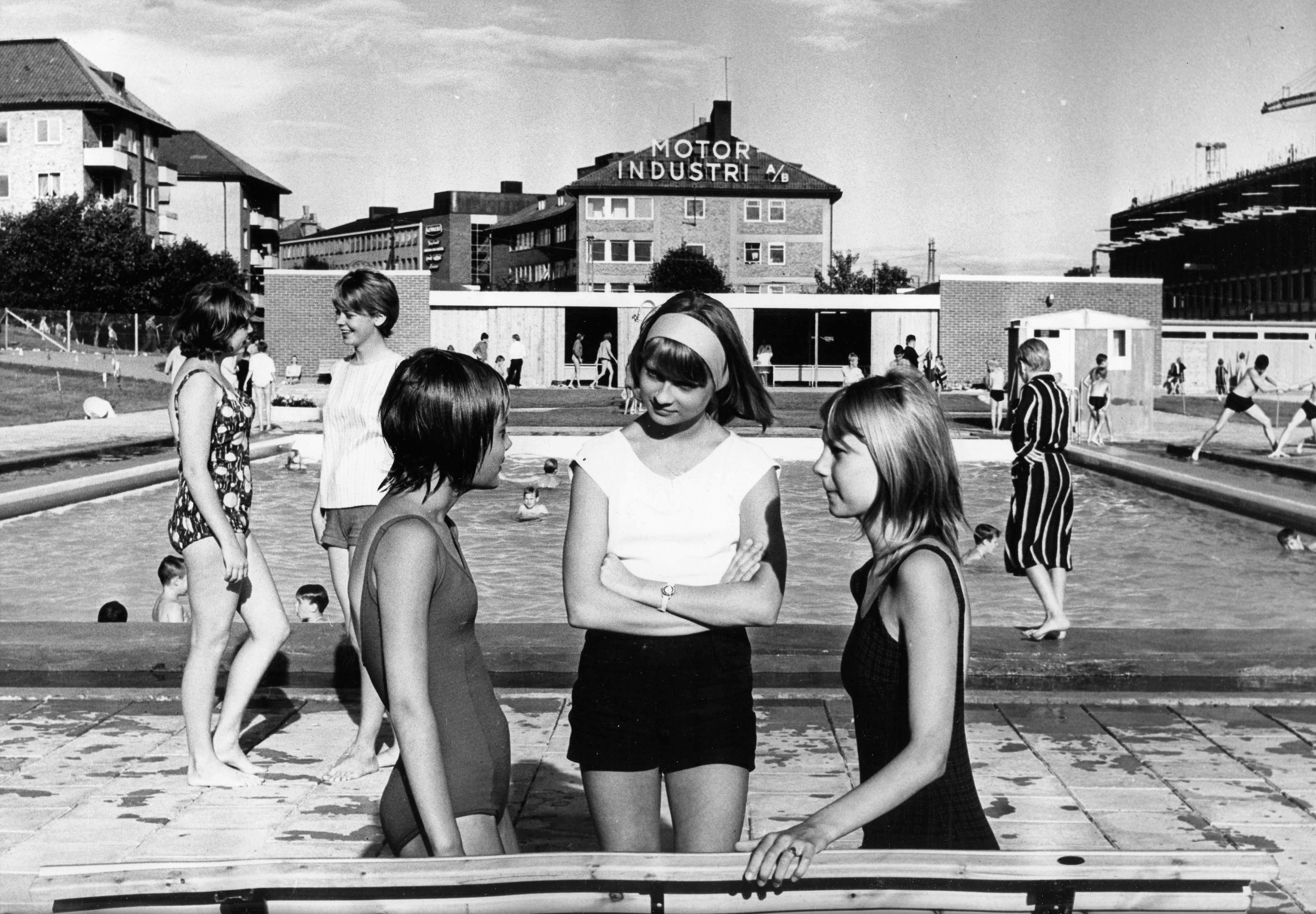 Kampementsbadet: vid bassängen 1962